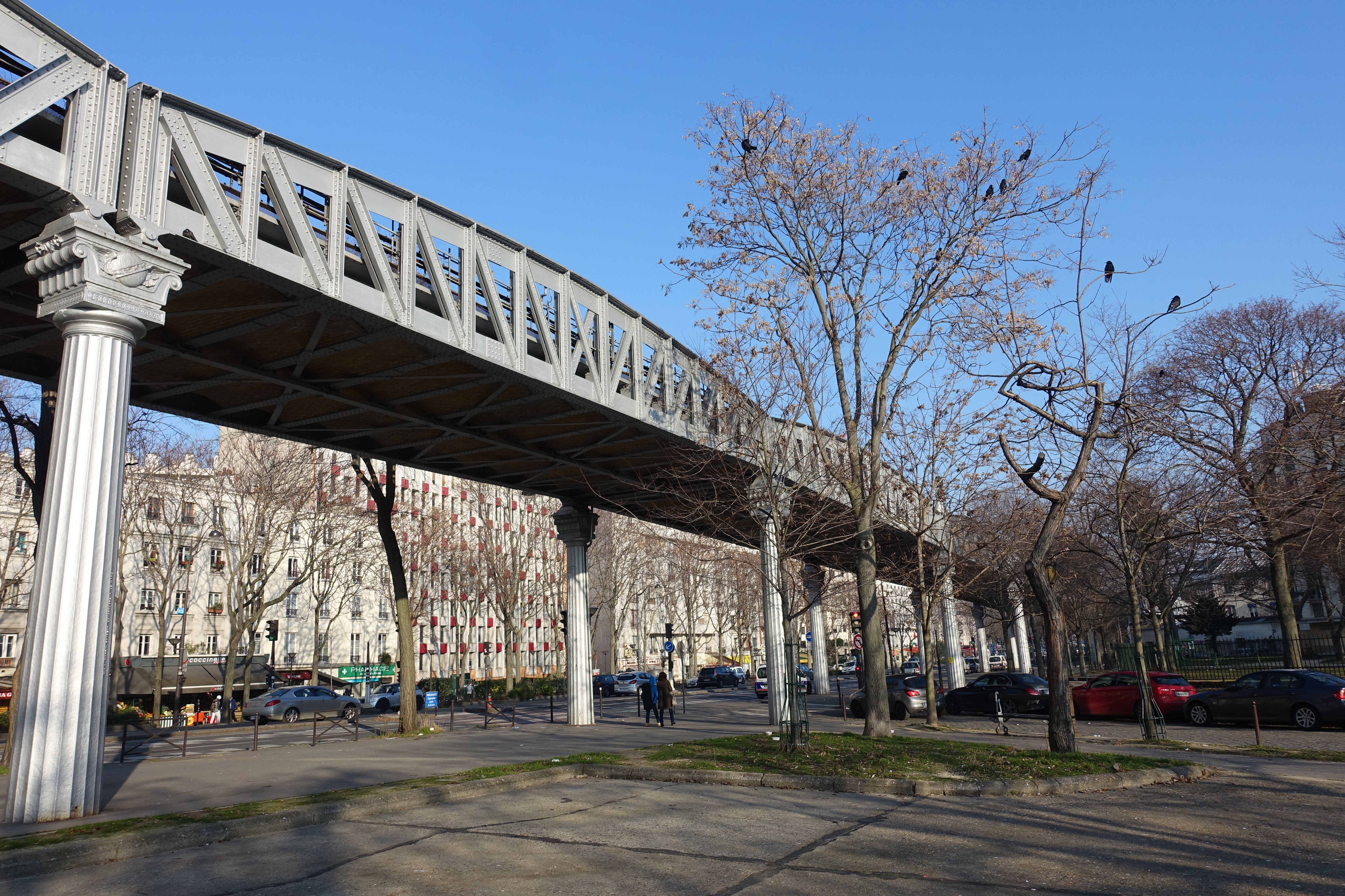 Viaduc de la ligne 5 du métro de Paris le long du boulevard de l'Hôpital, au droit du square Marie-Curie, à Paris 13e, France.